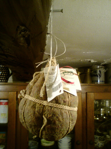 Salama da sugo, specialità ferrarese. Vedi altre imaggine qui